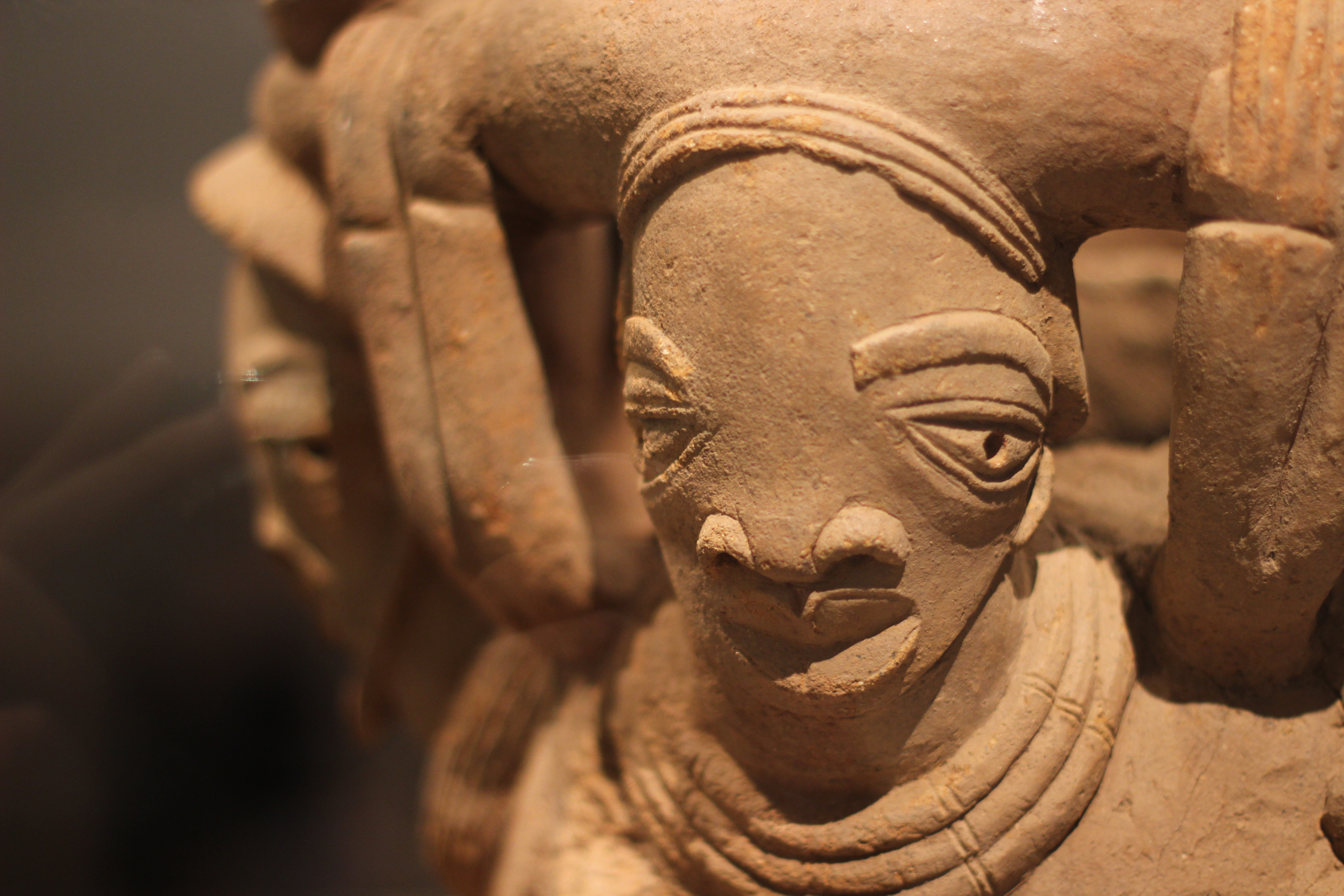 Sculpture de la culture Nok (VIe s. av. J.-C. - VIe s. ap. J.-C.). Nigeria. Terre cuite. Musée du Louvre.